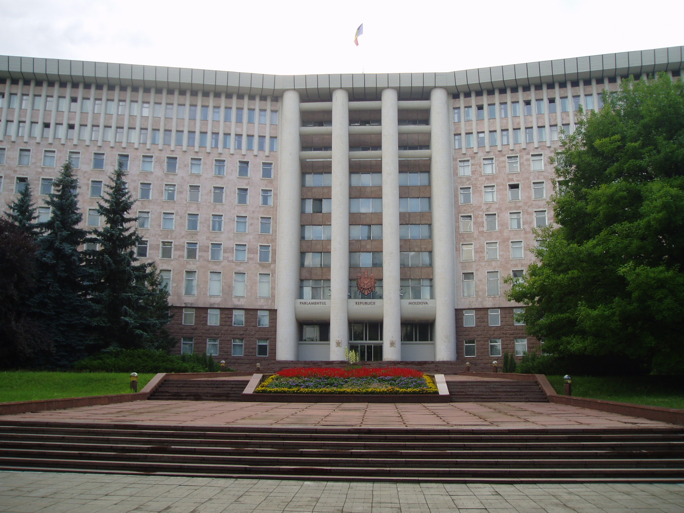 Parliament Building, Chișinău, Moldova